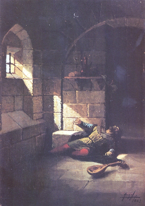 La muerte del trovador Macías.